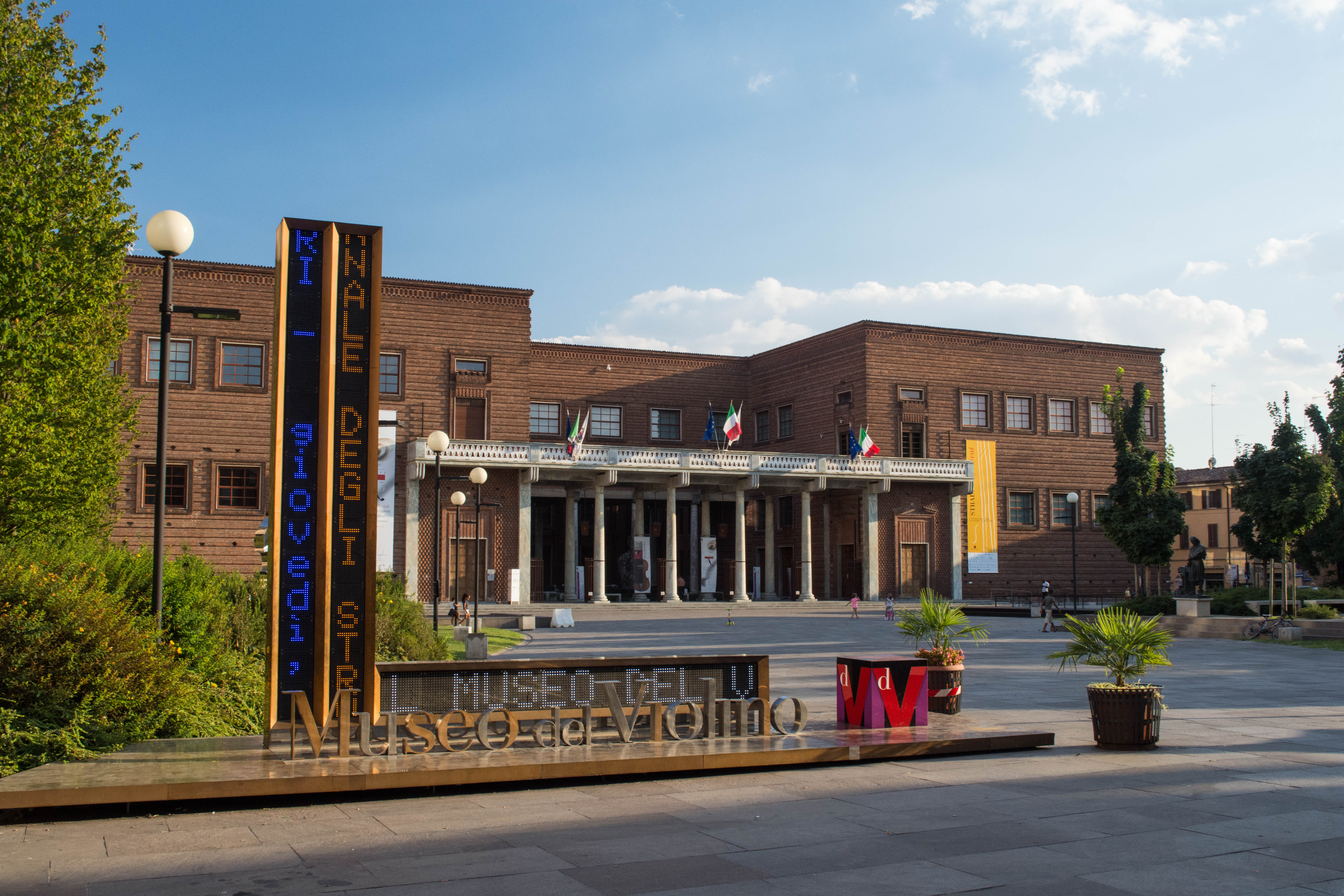 Palazzo dell'Arte - Museo del Violino This is a photo of a monument which is part of cultural heritage of Italy.